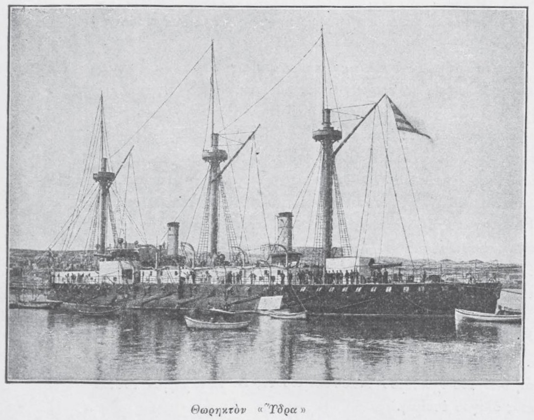 Ύδρα (θωρηκτό) Griechischer Kanonenträger.